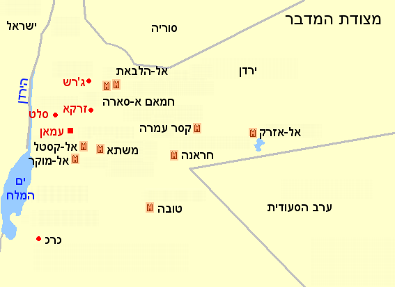 מצודות המדבר בירדן